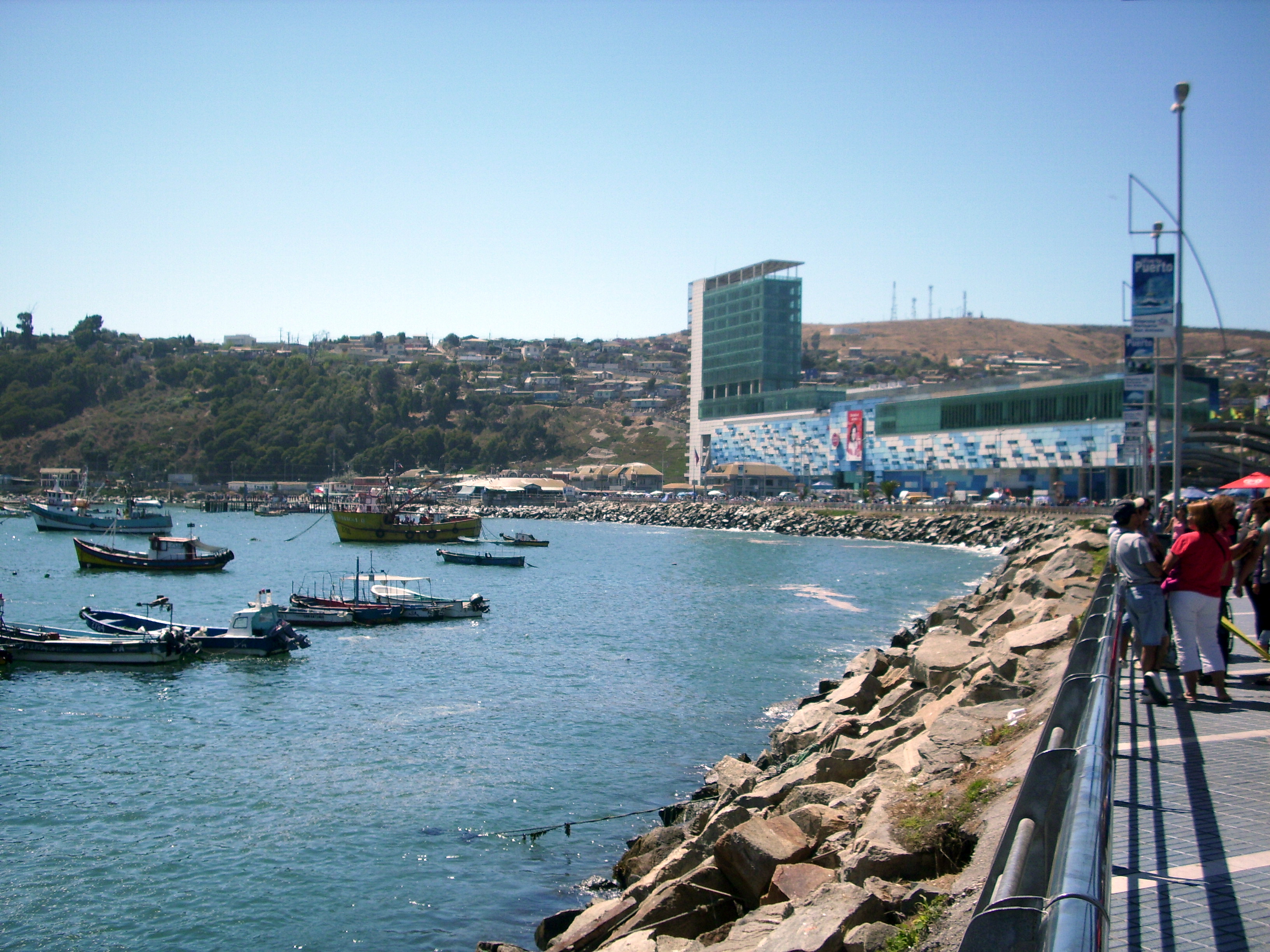 El Paseo Bellamar y el Mall Arauco San Antonio en el Puerto de San Antonio. V Región de Valparaíso, Chile.